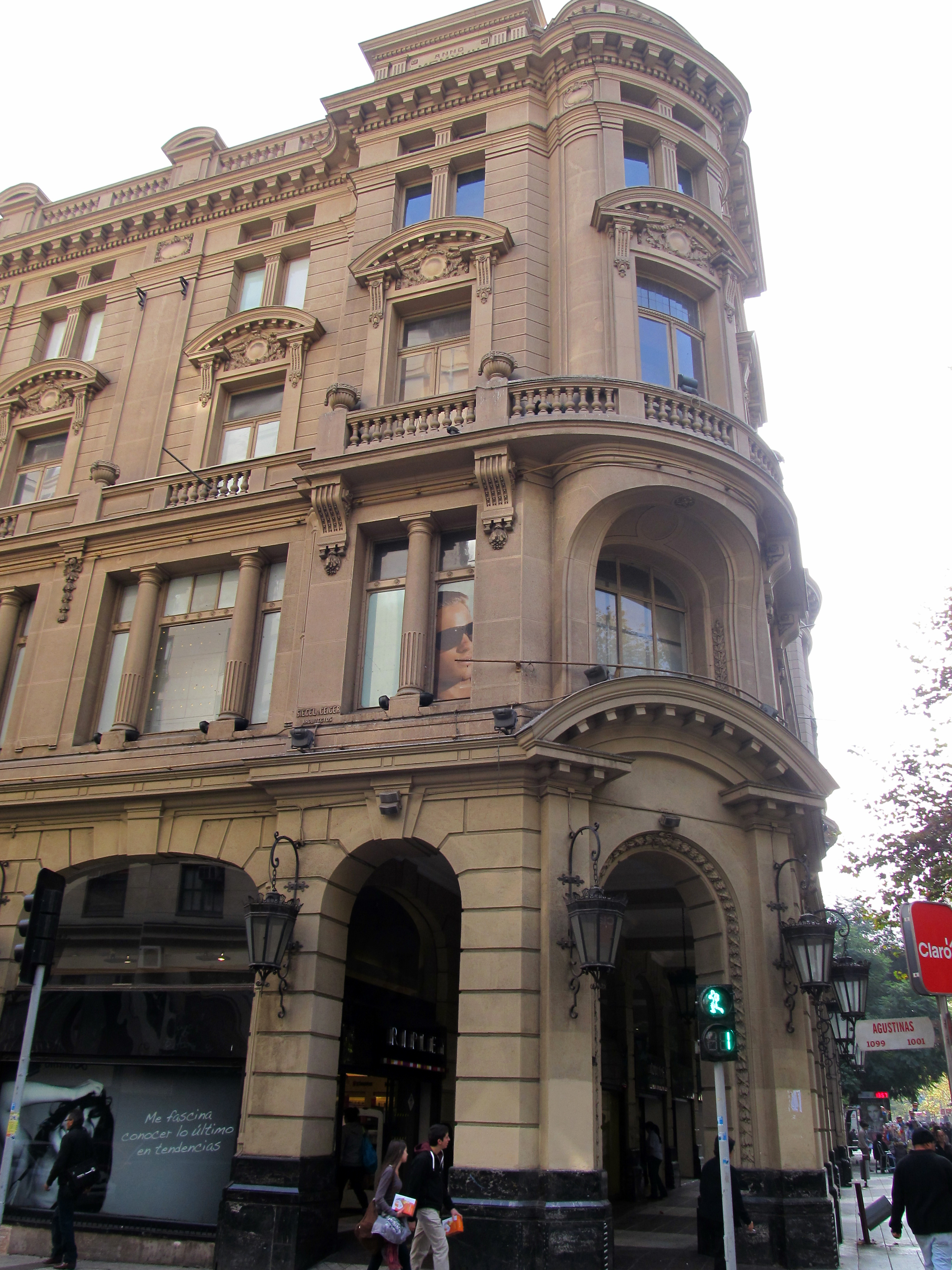 Edificio del ex Hotel Crillón, Santiago, Chile.